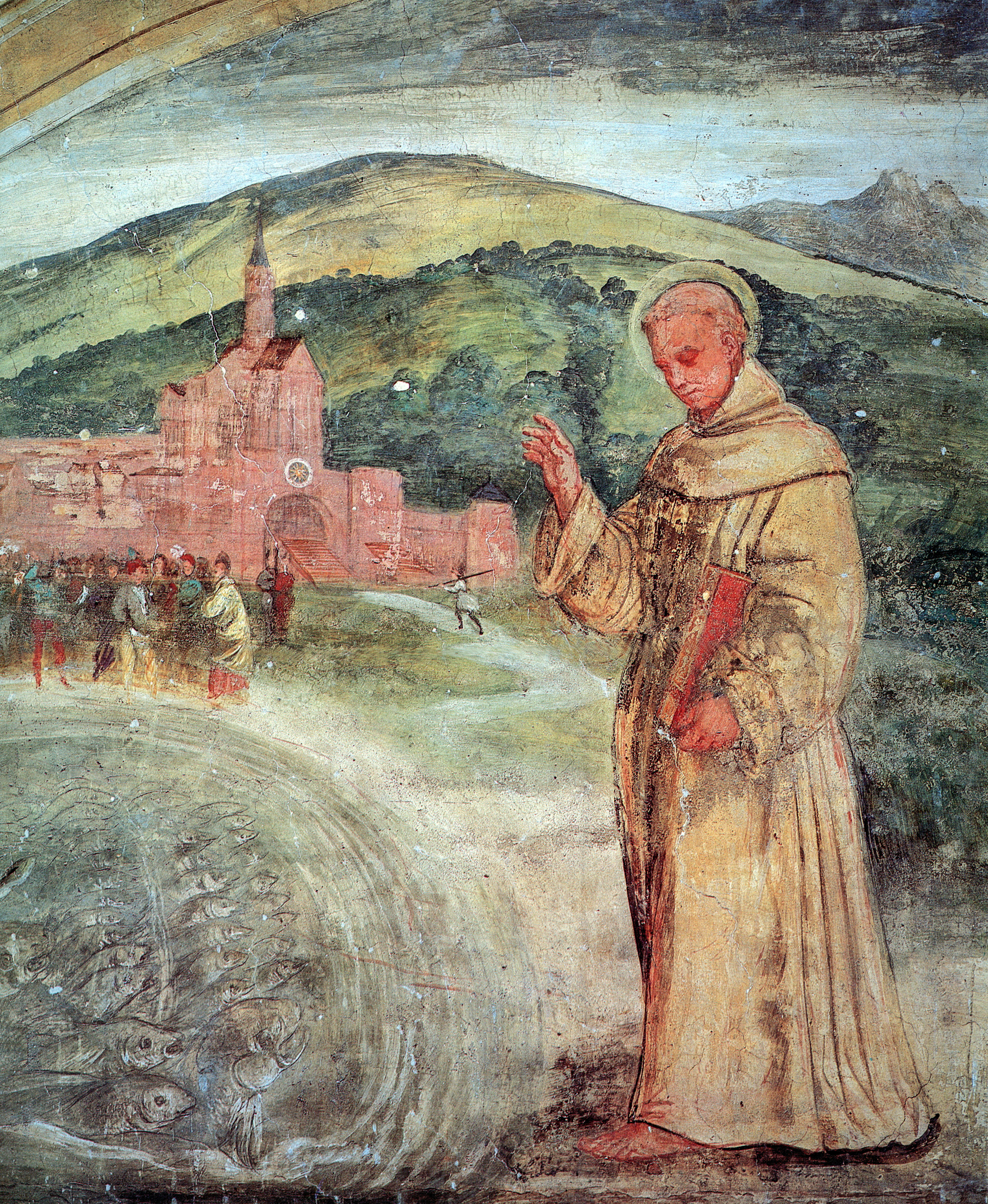 La predica di Sant?Antonio ai pesci, Girolamo Tassari, 1335-1337, Eremo del Noce, Camposampiero